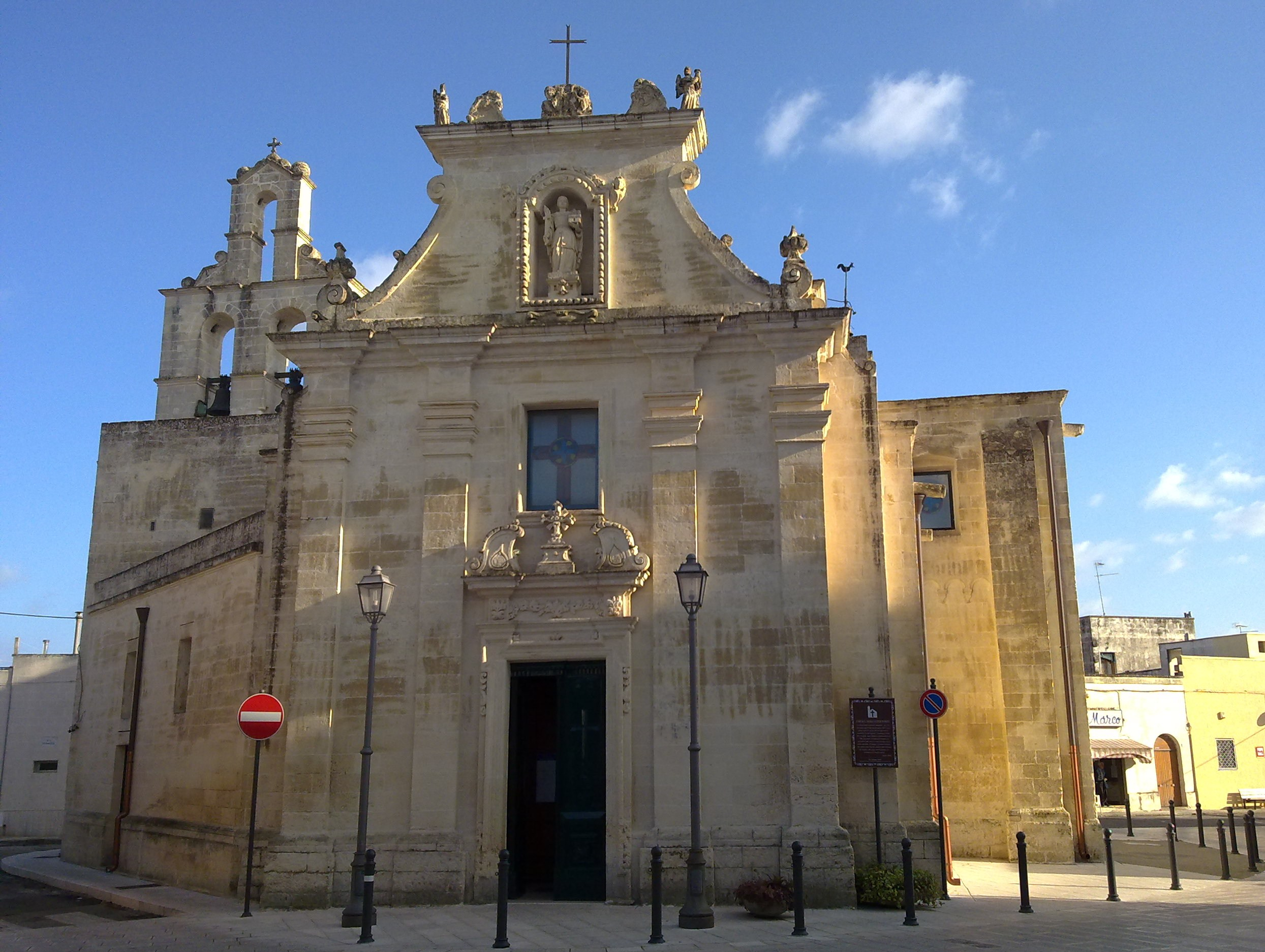 Chiesa Madre di Pisignano, Vernole, Lecce